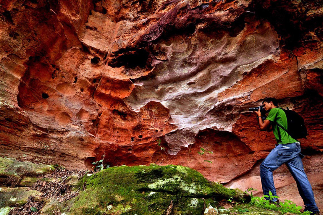 Descrição_para_sua_foto